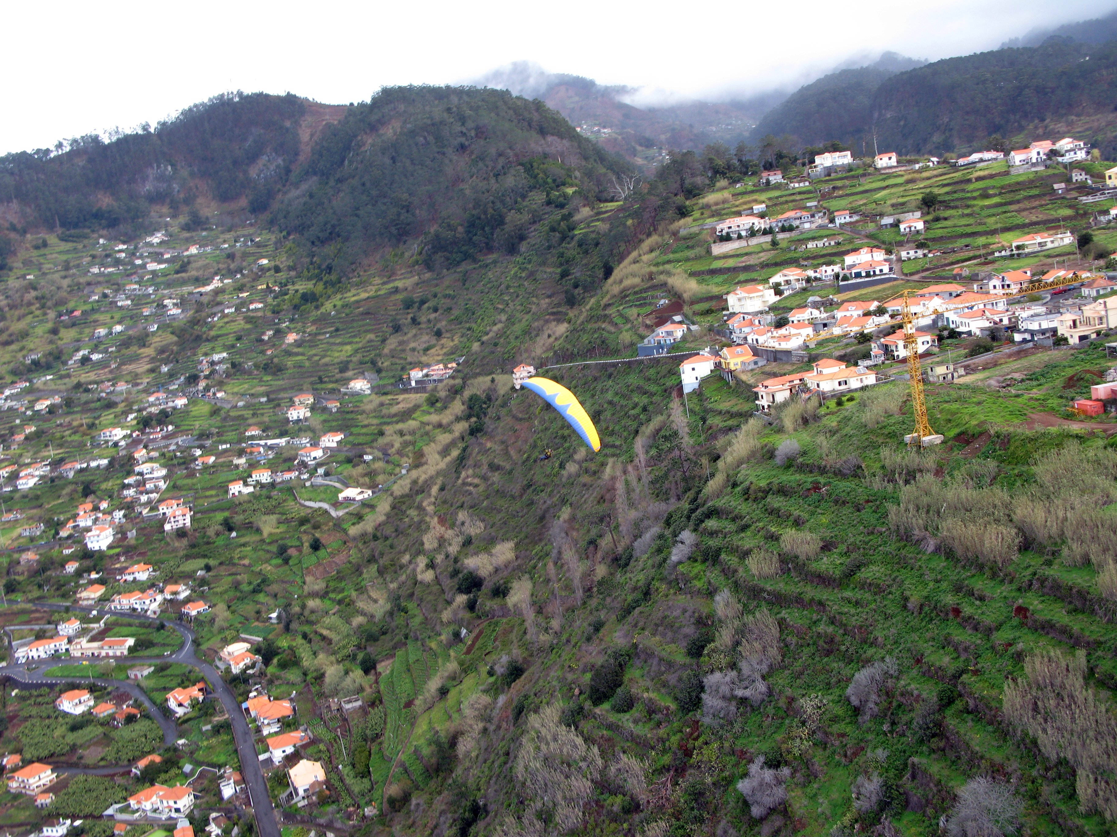 Paragliding at Arco da Calheta - Madeira